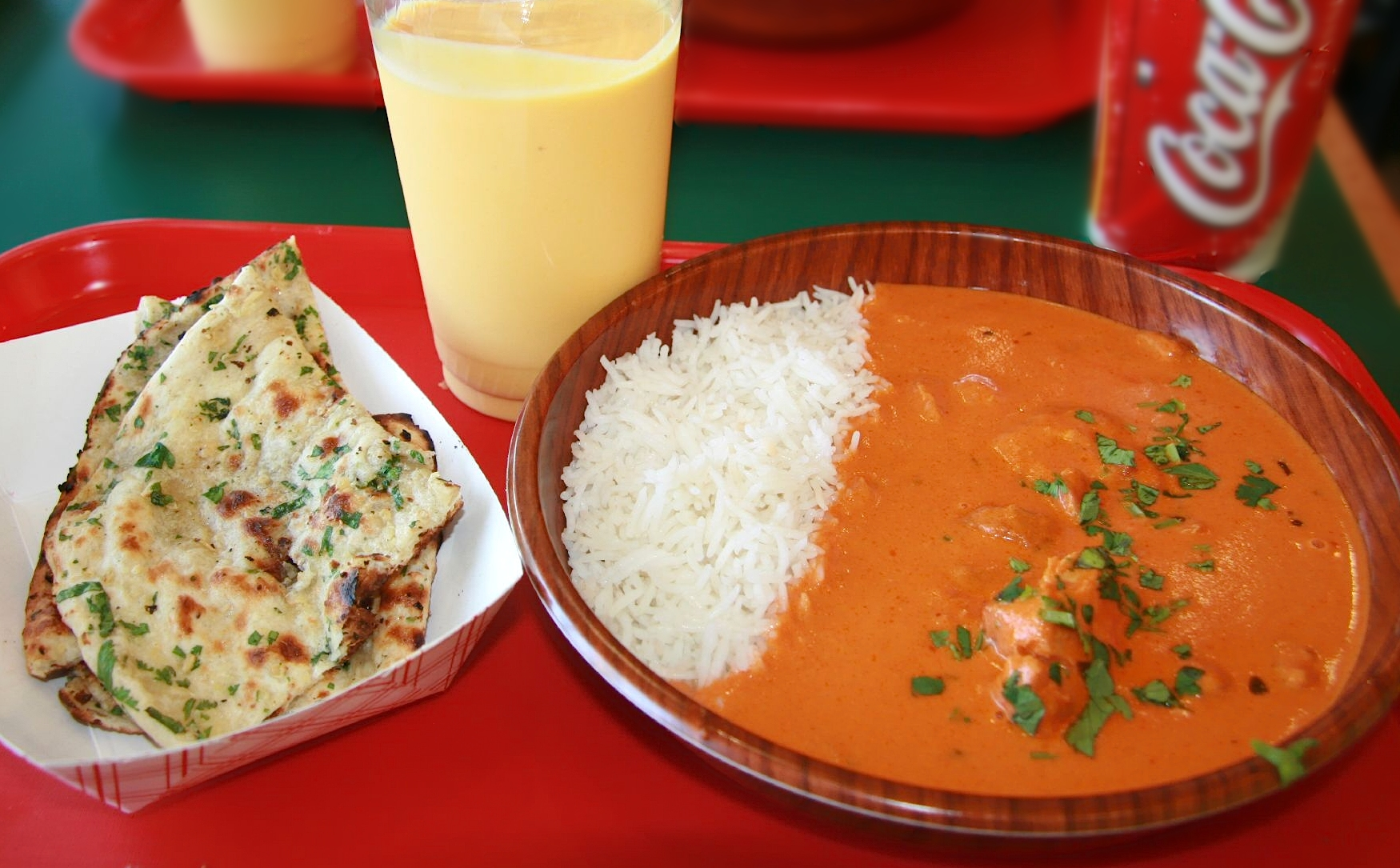 Chicken Tikka Masala mit Reis und Naan-Brot, dazu als Getränk: Mango-Lassi.